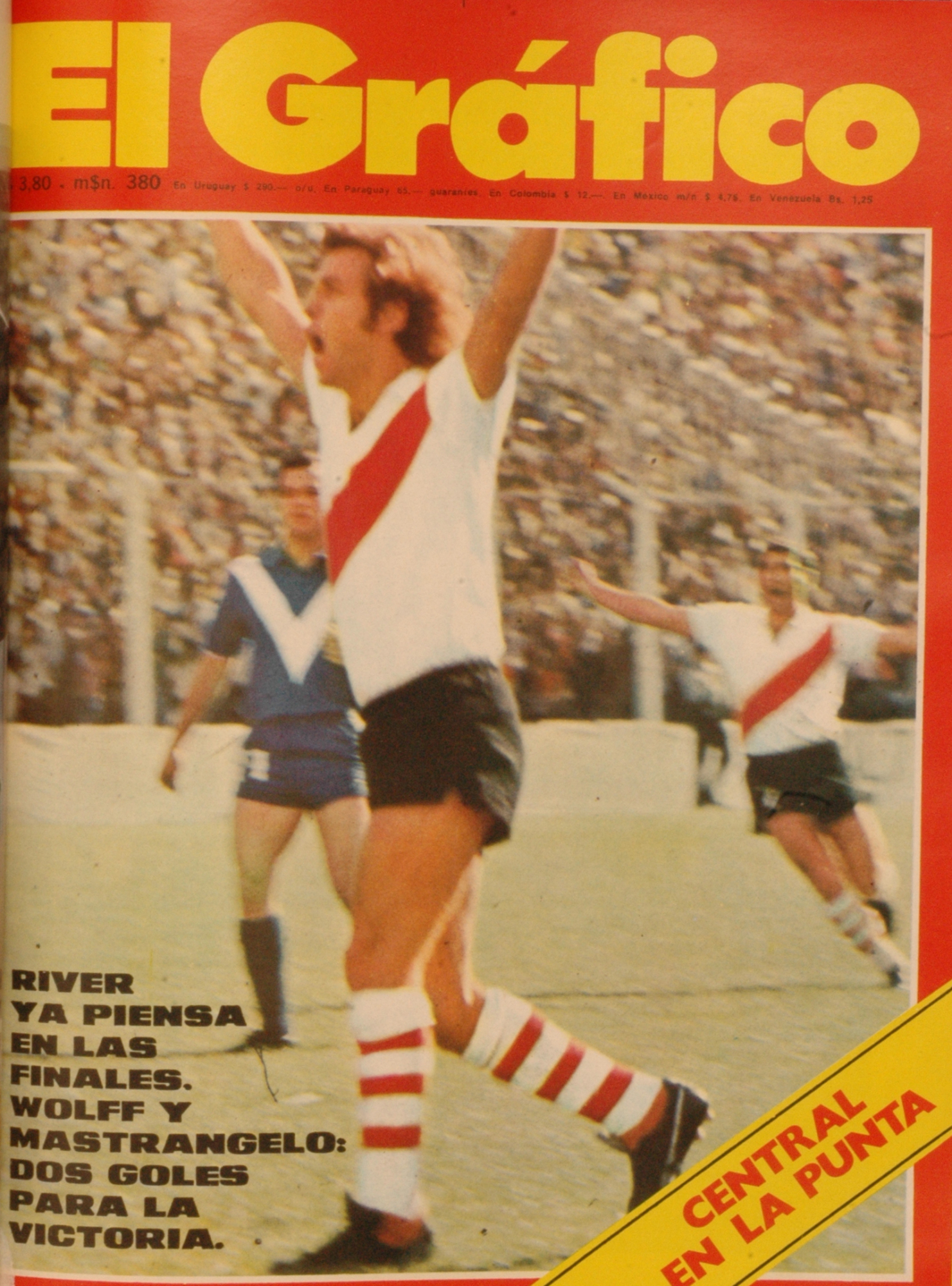 El Grafico del 27 de Noviembre de 1973. Edicion 2825